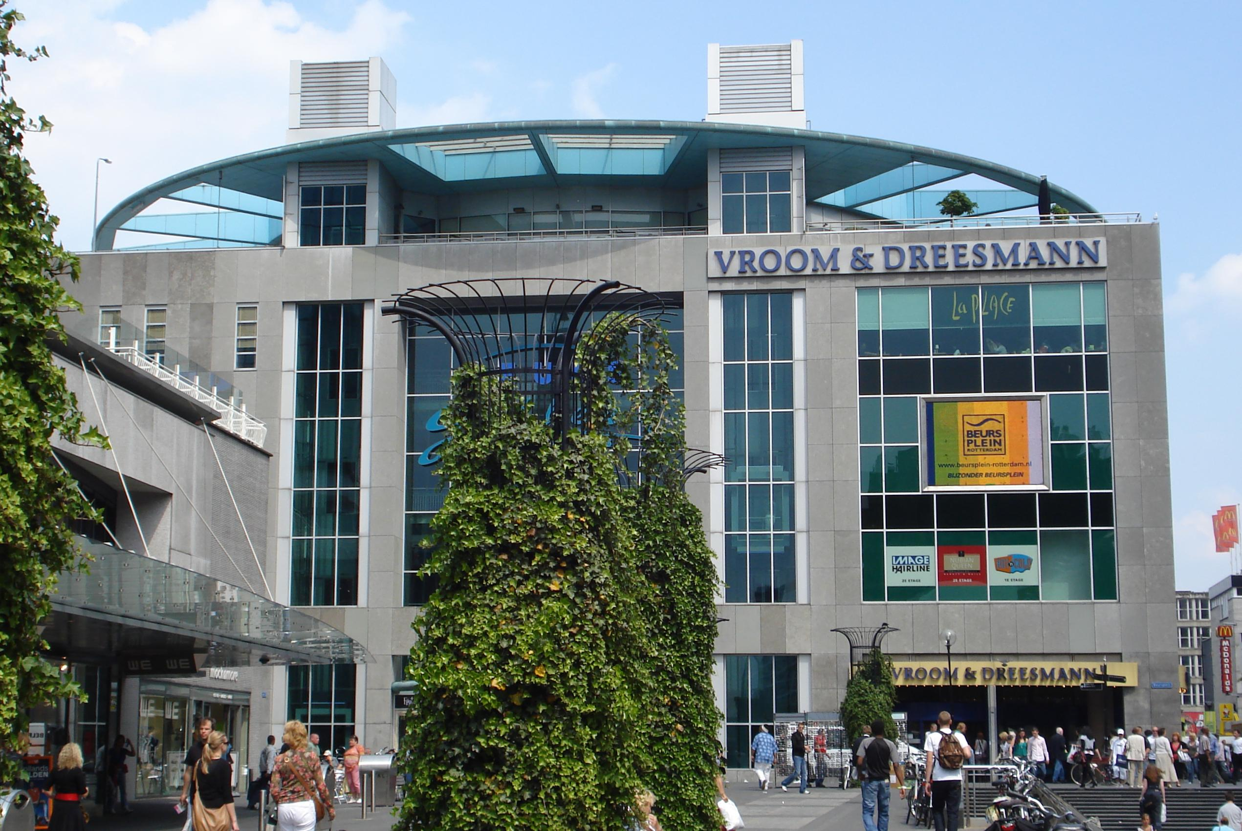 Rotterdam, centrum. V&D-gebouw.